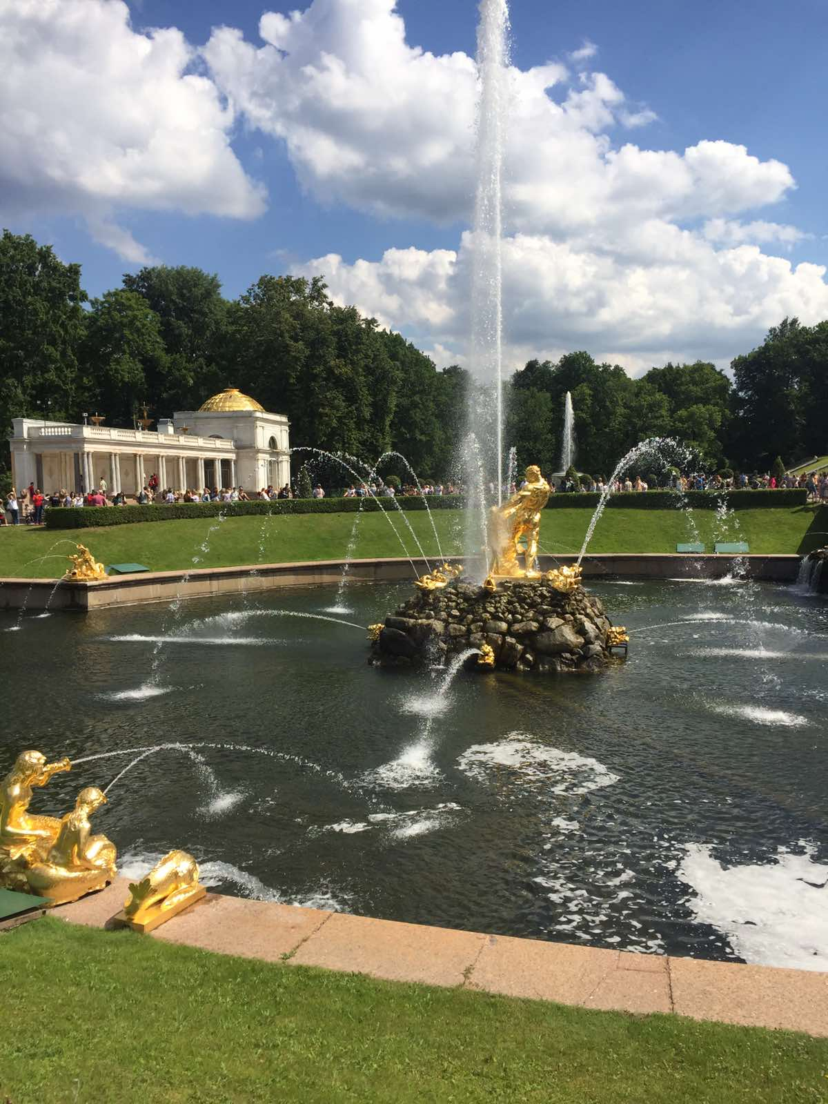 One of the fountains of Peterhof